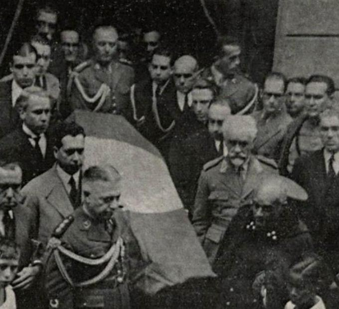 O esquife do Comandante Celso Pestana é carregado pelos Ministros da Guerra e da Marinha e por outras autoridades.